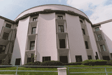 Sede Via Parenzo